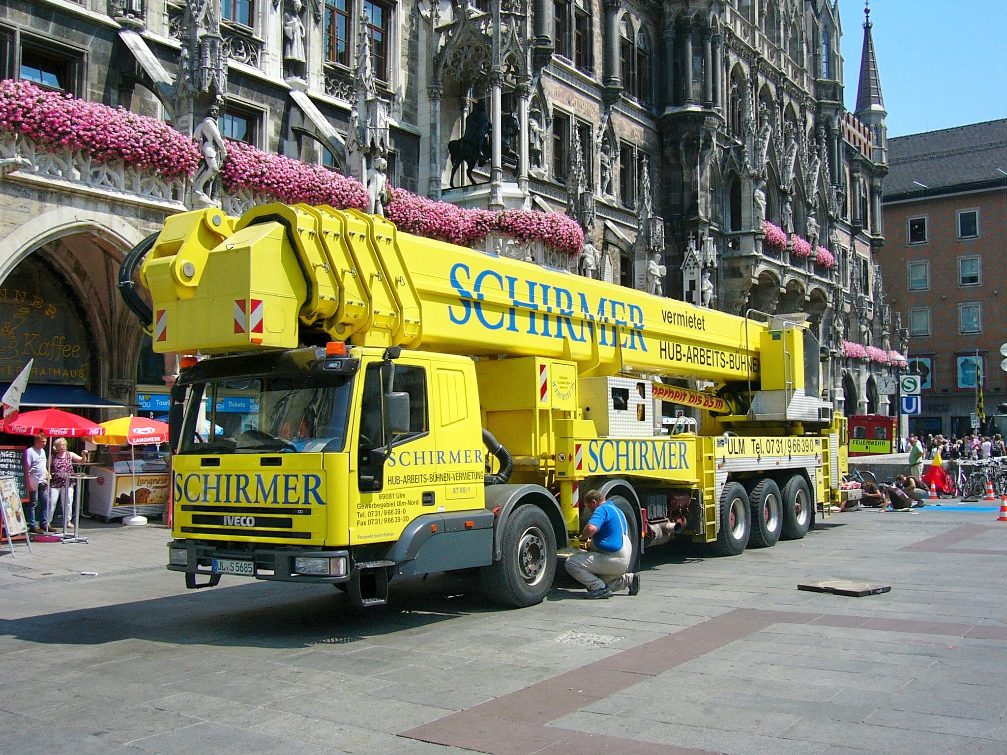 Hubarbeitsbühne (Teleskopbühne) WT 850 WUMAG elevant, auf schwerem LKW (Iveco EuroCargo)